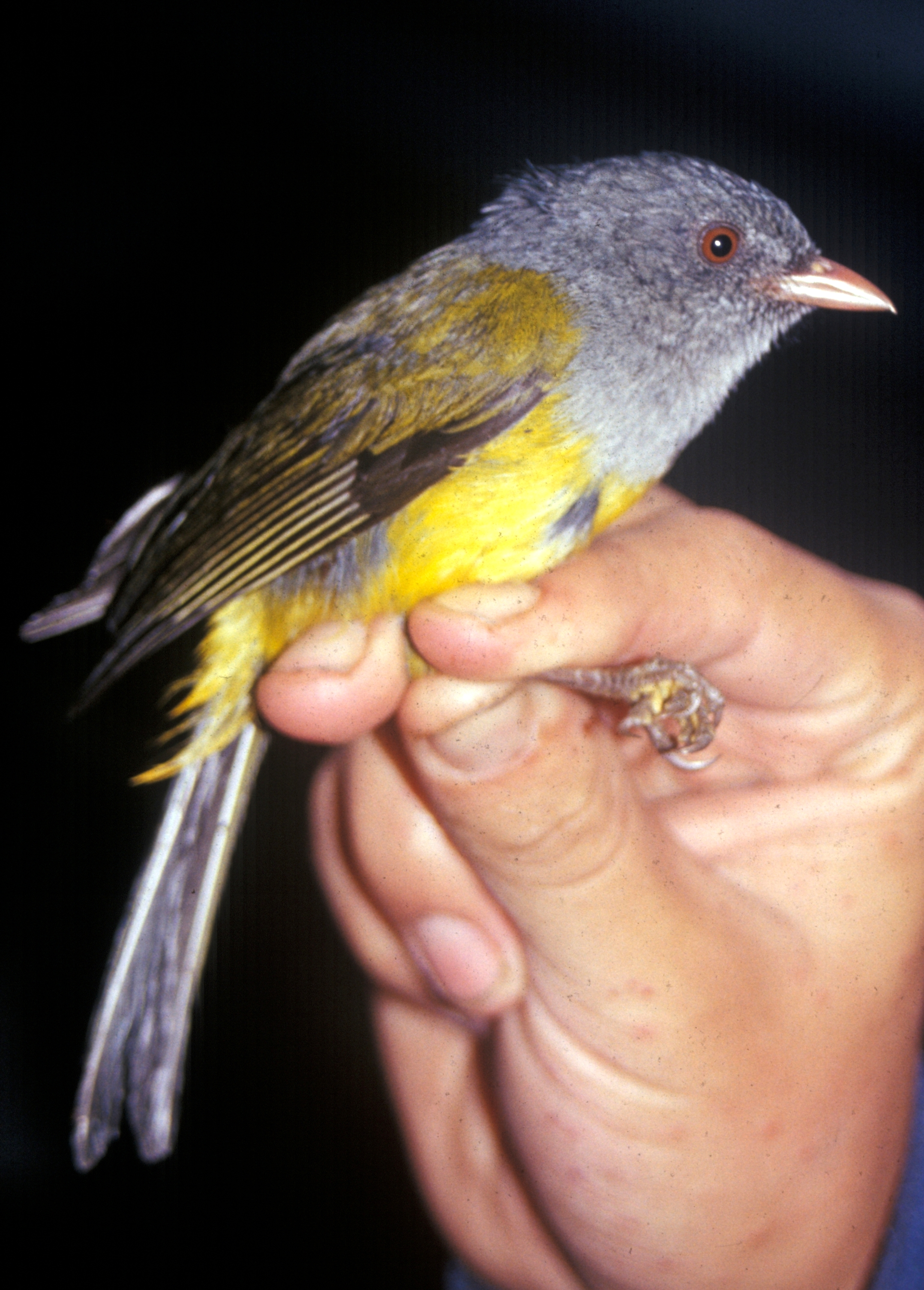 Grey-hooded Bush-tanager (Cnemoscopus rubrirostris) from Cordillera del Cóndor, Ecuador.